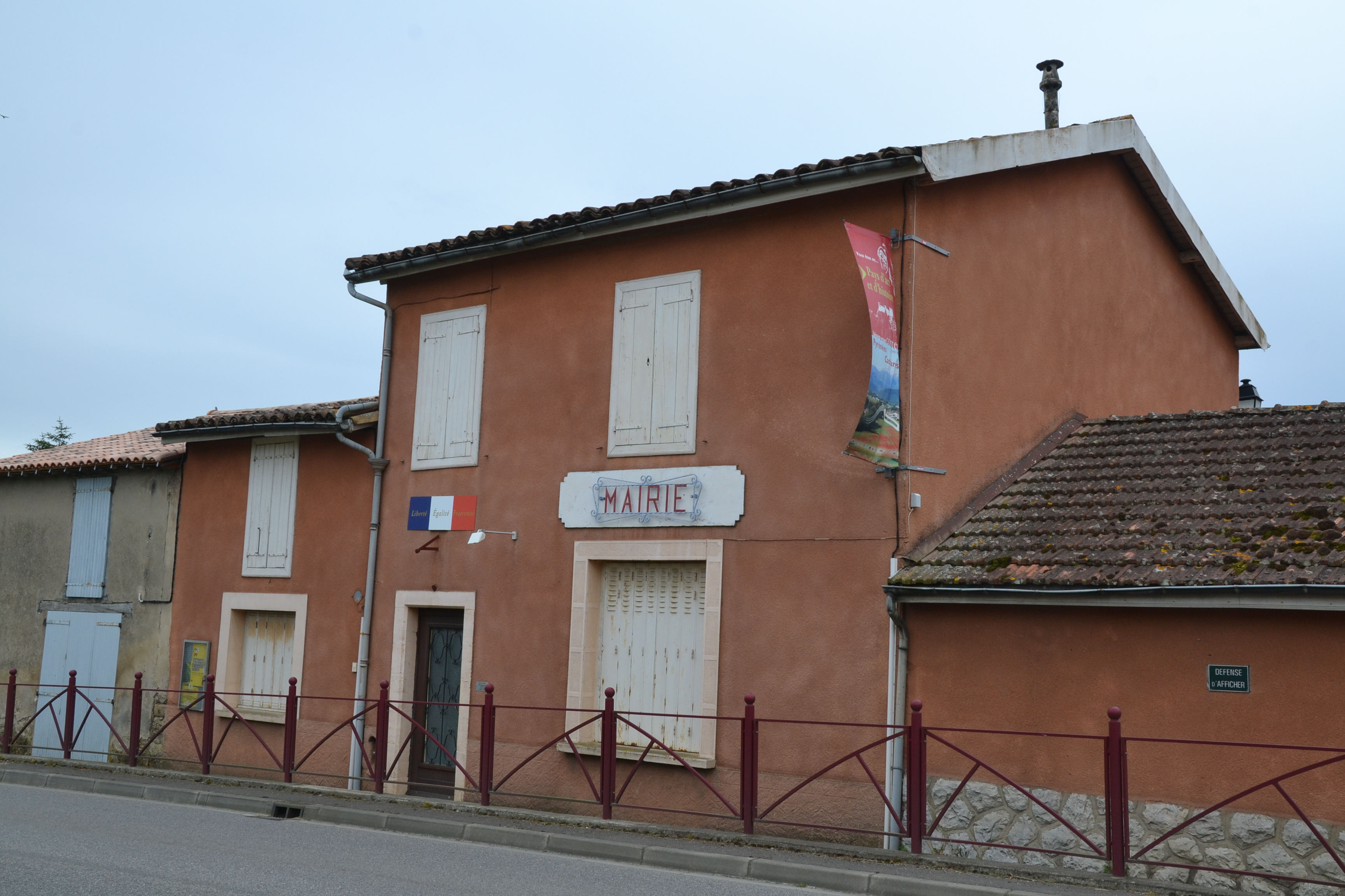 Mairie de Coutens (Ariège, France).